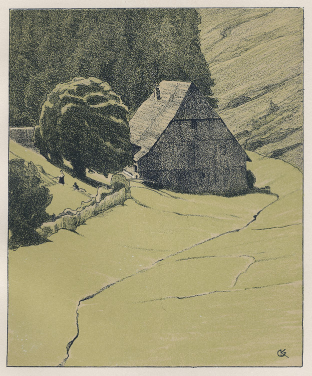 Talmühle